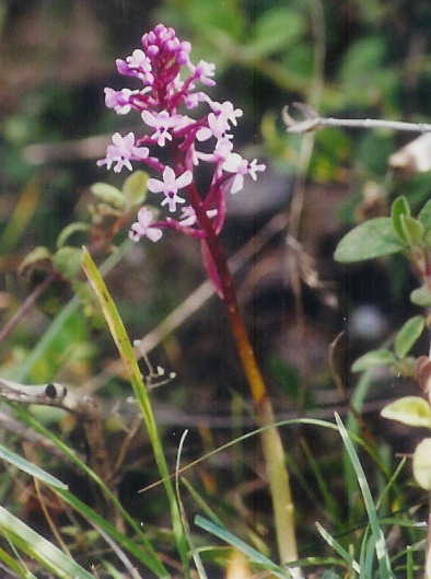 Orchis brancifortii, immagine acquisita tramite scansione su foto scattata personalmente. Michele Iannizzotto